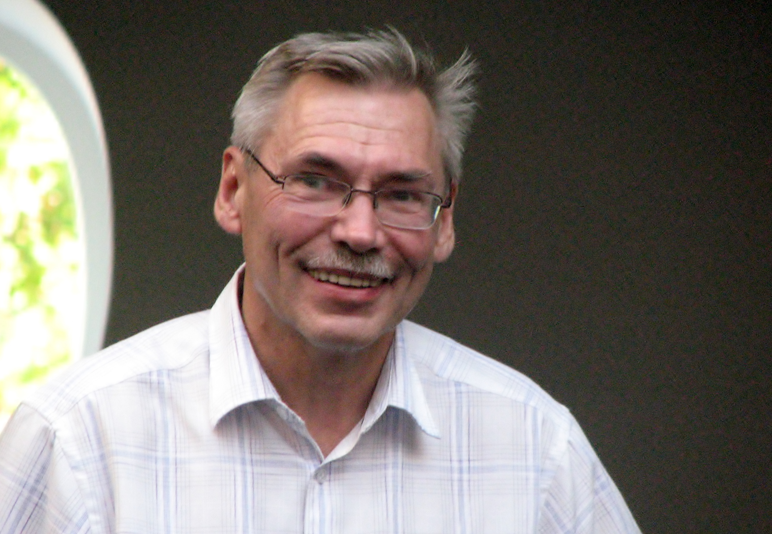 Ivo Sillamaa Estonia maja juubelipidustuste raames autogrammitunnis